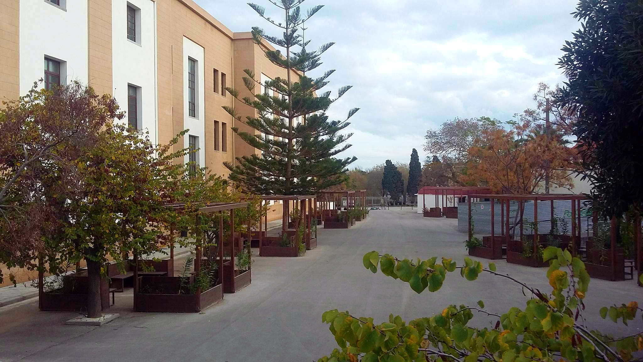 Πανεπιστήμιο Αιγαίου, Ρόδος - (πίσω αυλή)